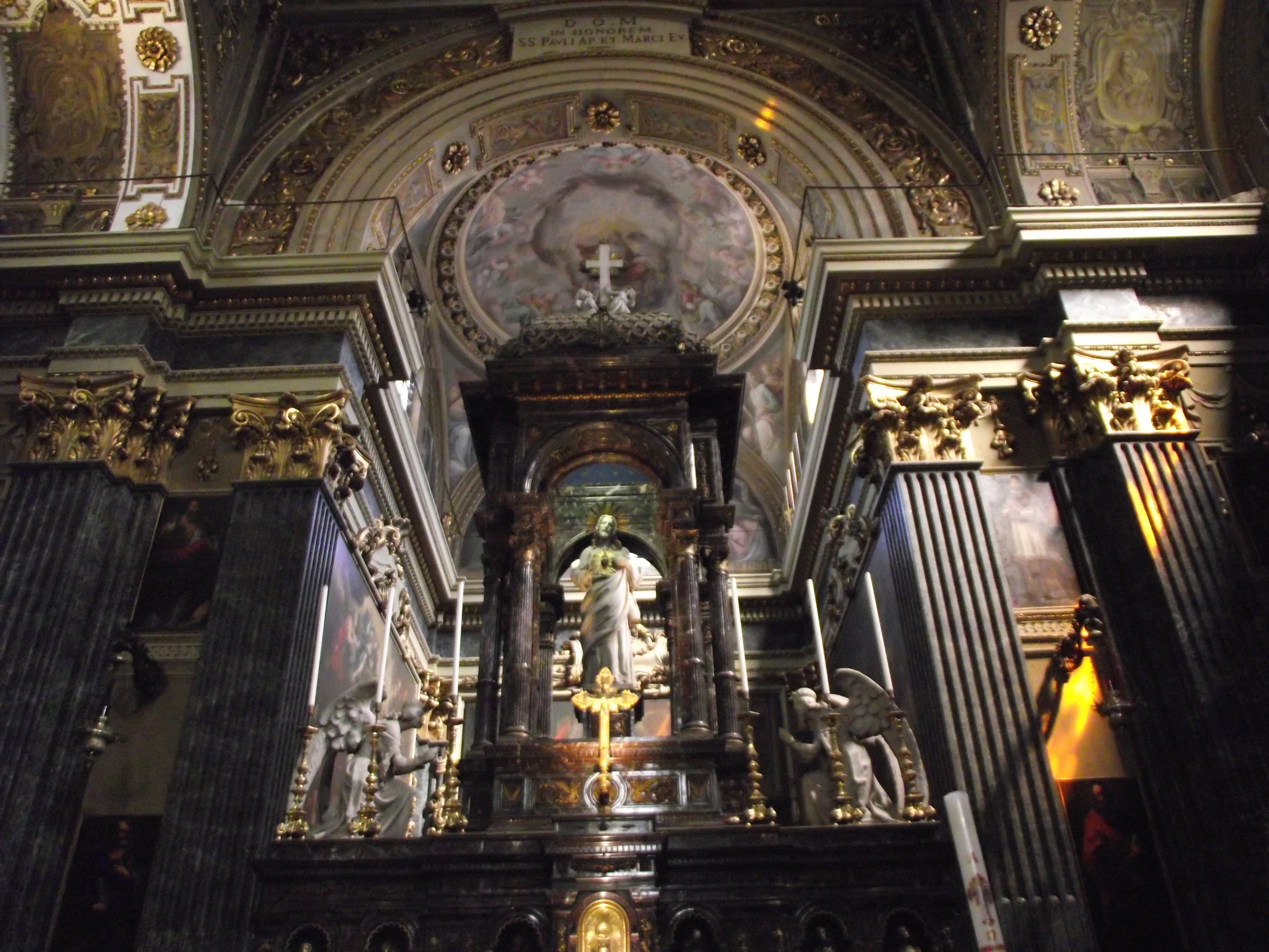 Altar maggiore